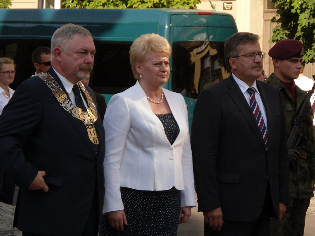 Zdjęcie zrobione podczas 600. rocznicy bitwy pod Grunwaldem w Krakowie z udziałem prezydenta elekta Polski oraz prezydent Litwy.